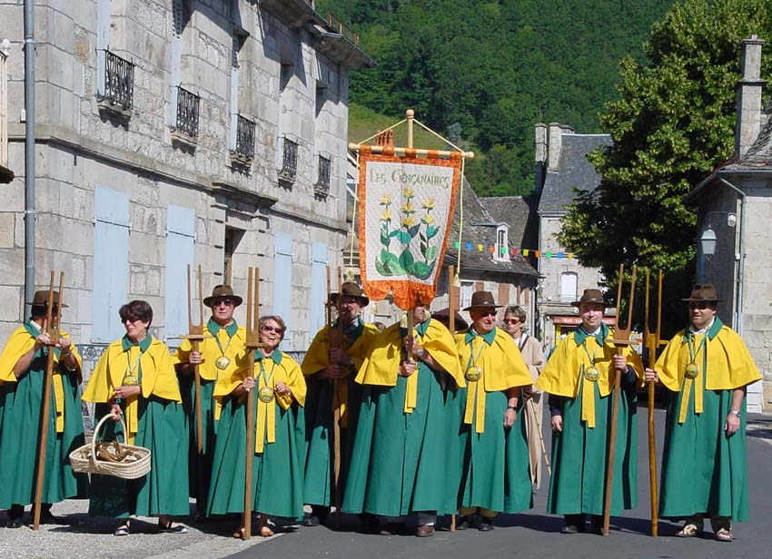 Description conférie des gencanaires Date2004SourceSelf-photographedAuthorcharlespierrePermission(Reusing this file) charlespierre conférie des gencanaires